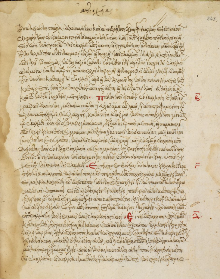 Правила поместного Антиохийского собора. Греческая рукопись, ноябрь 1600 года. Британская библиотека.